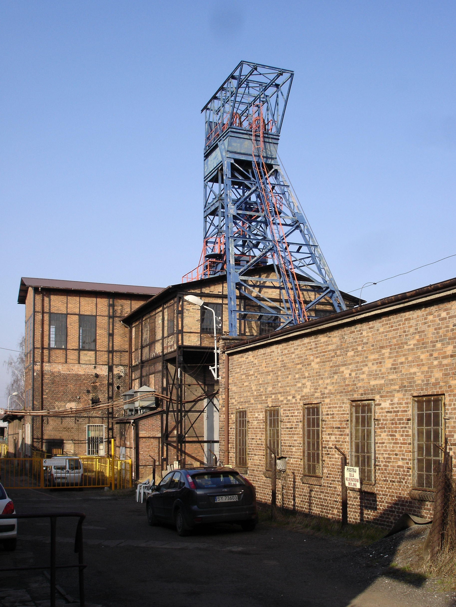 Zabudowania dawnej kopalni Fiedlersglück, wieża wyciągowa szybu Bolko, Bytom, ul. Kruszcowa.